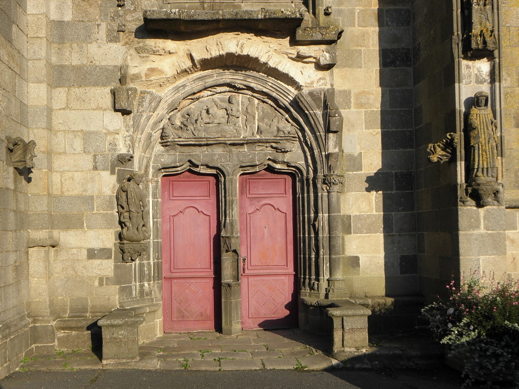 Portail occidental et arrachements d'un ancien porche. Façade occidentale de la basilique Notre-Dame du Folgoët (29). .